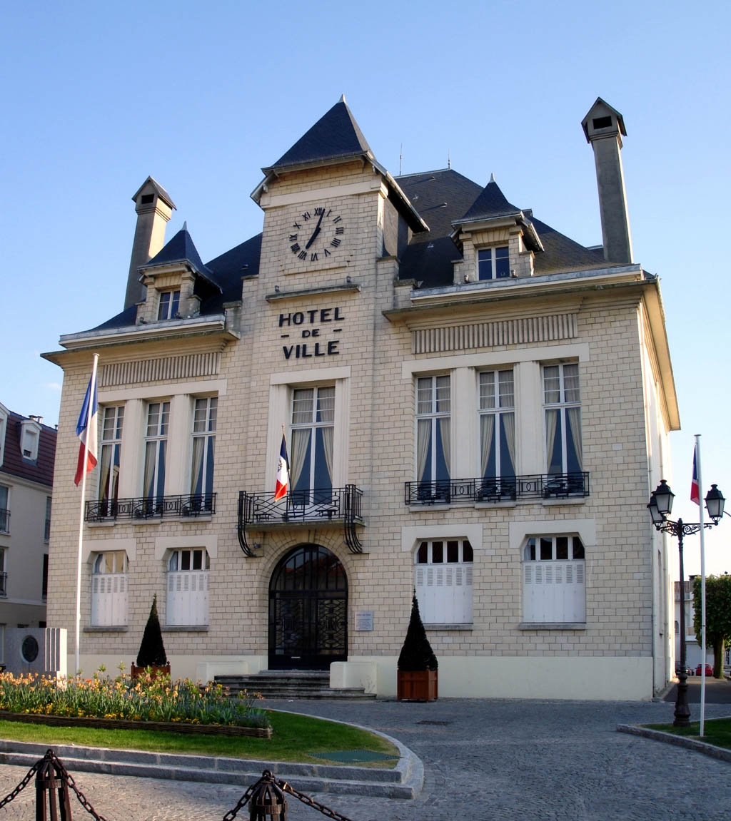 L'hôtel de ville de Deuil-la-Barre (France)